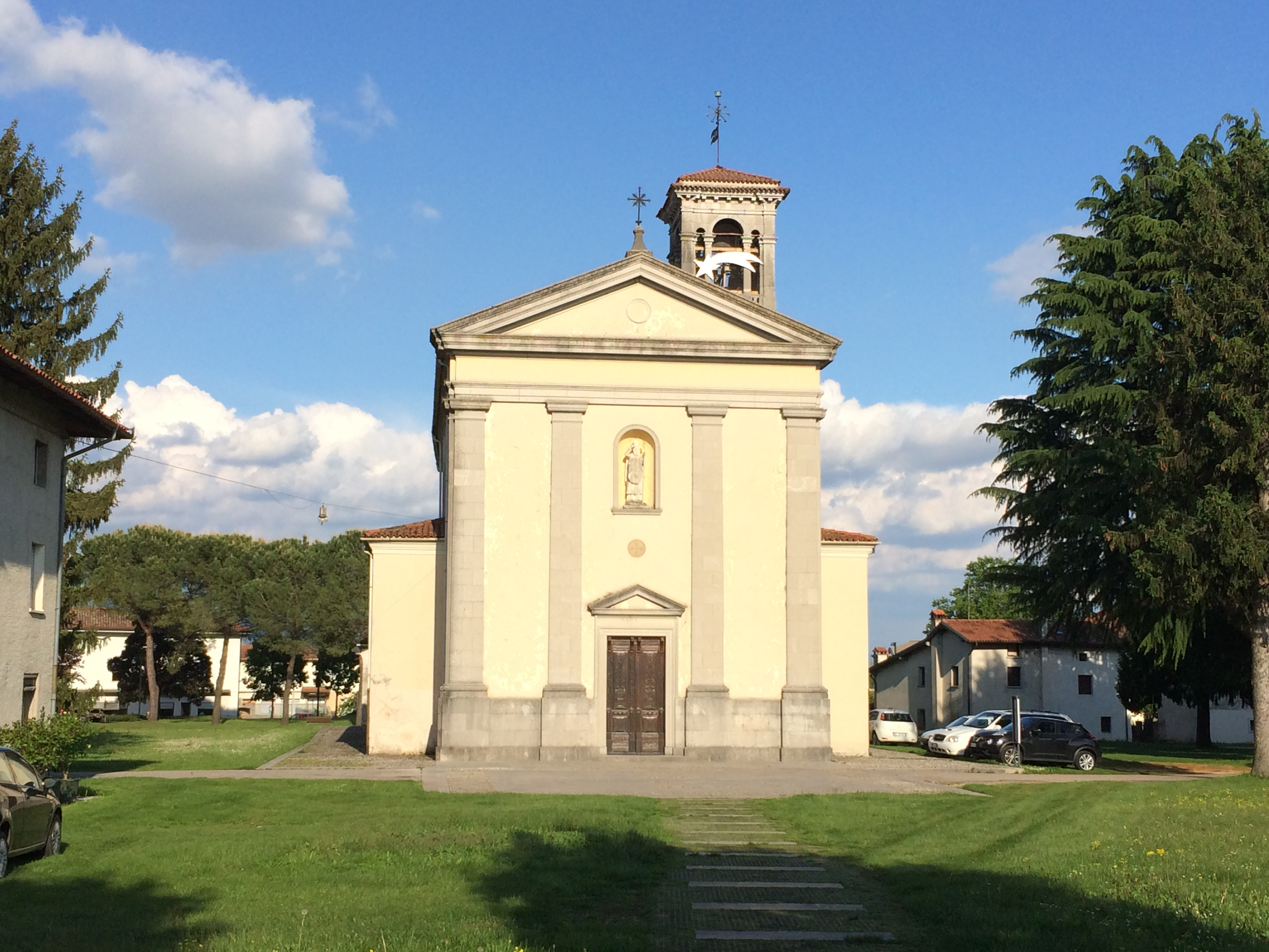 Reana Rojale - Chiesa Santi Felice Fortunato 1